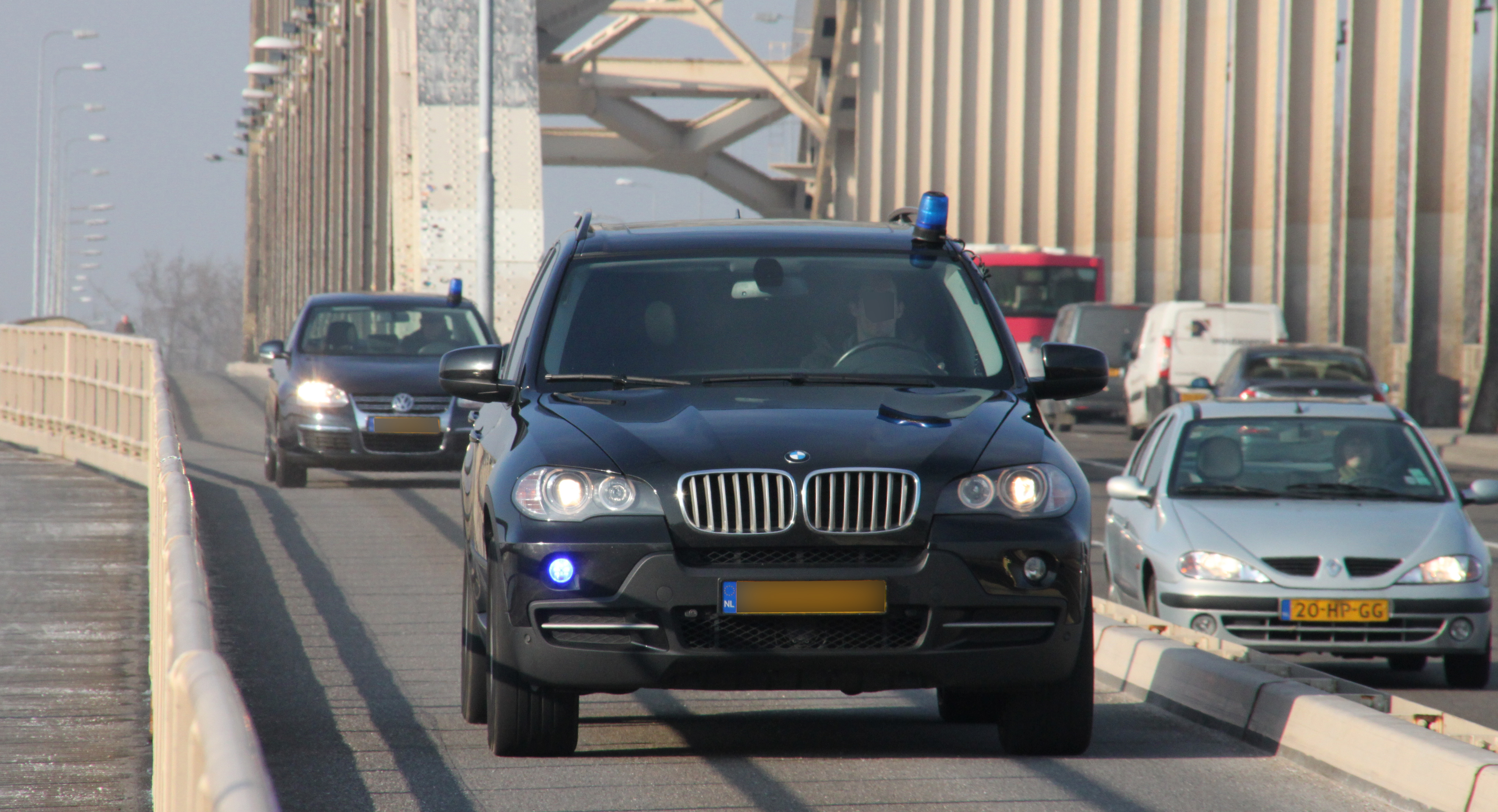 Twee onopvallende voertuigen het arrestatieteam met spoed over de Waalbrug in Nijmegen.